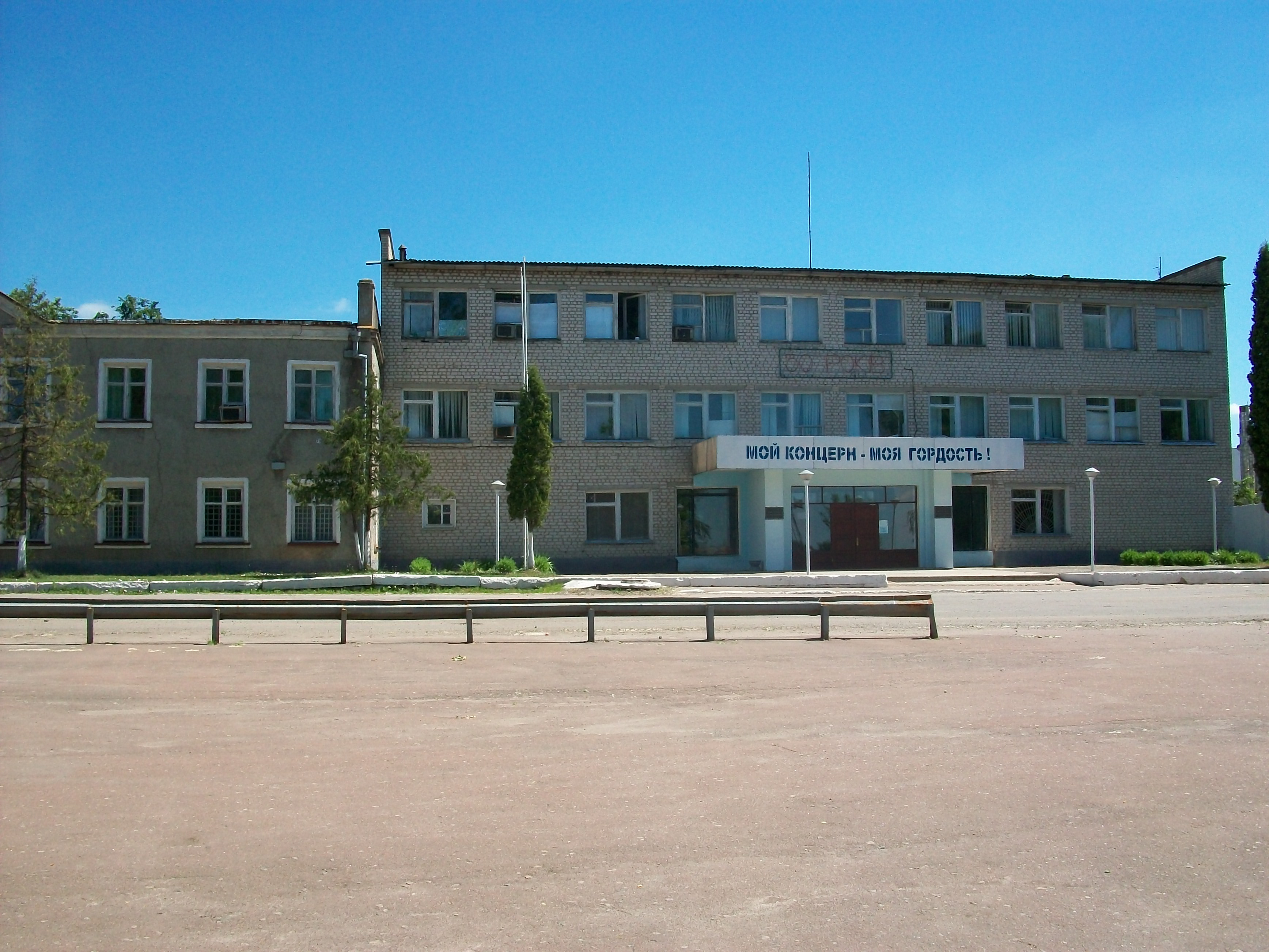 Глуховский завод «Электропанель»